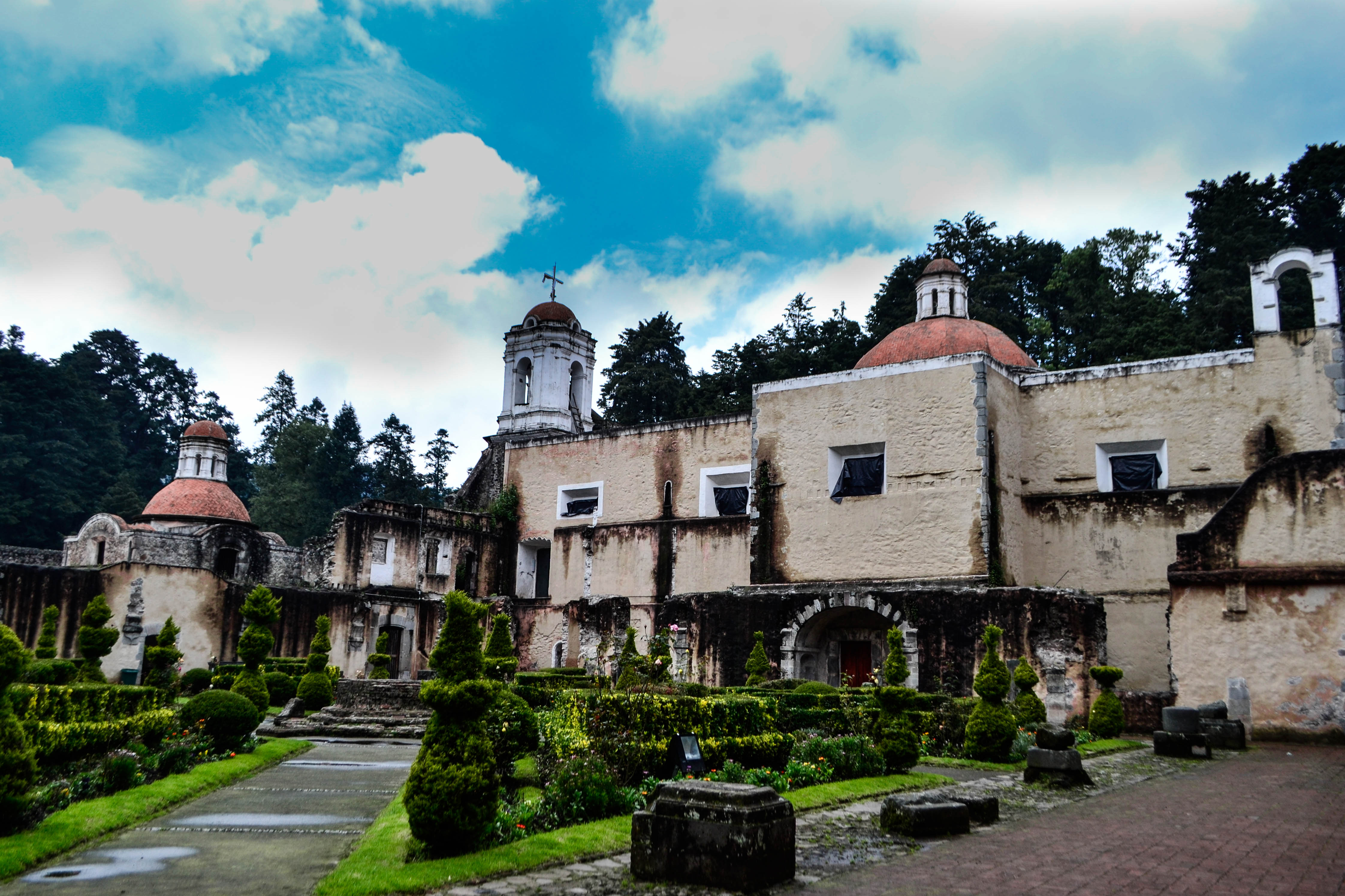 Vista de perfil a detalle del ex Convento desde la entrada del jardín. En la pared inferior se puede observar la estructura del jardín de la fuente y el espacio amplio en el cual, actualmente, se pueden hacer eventos y reuniones.